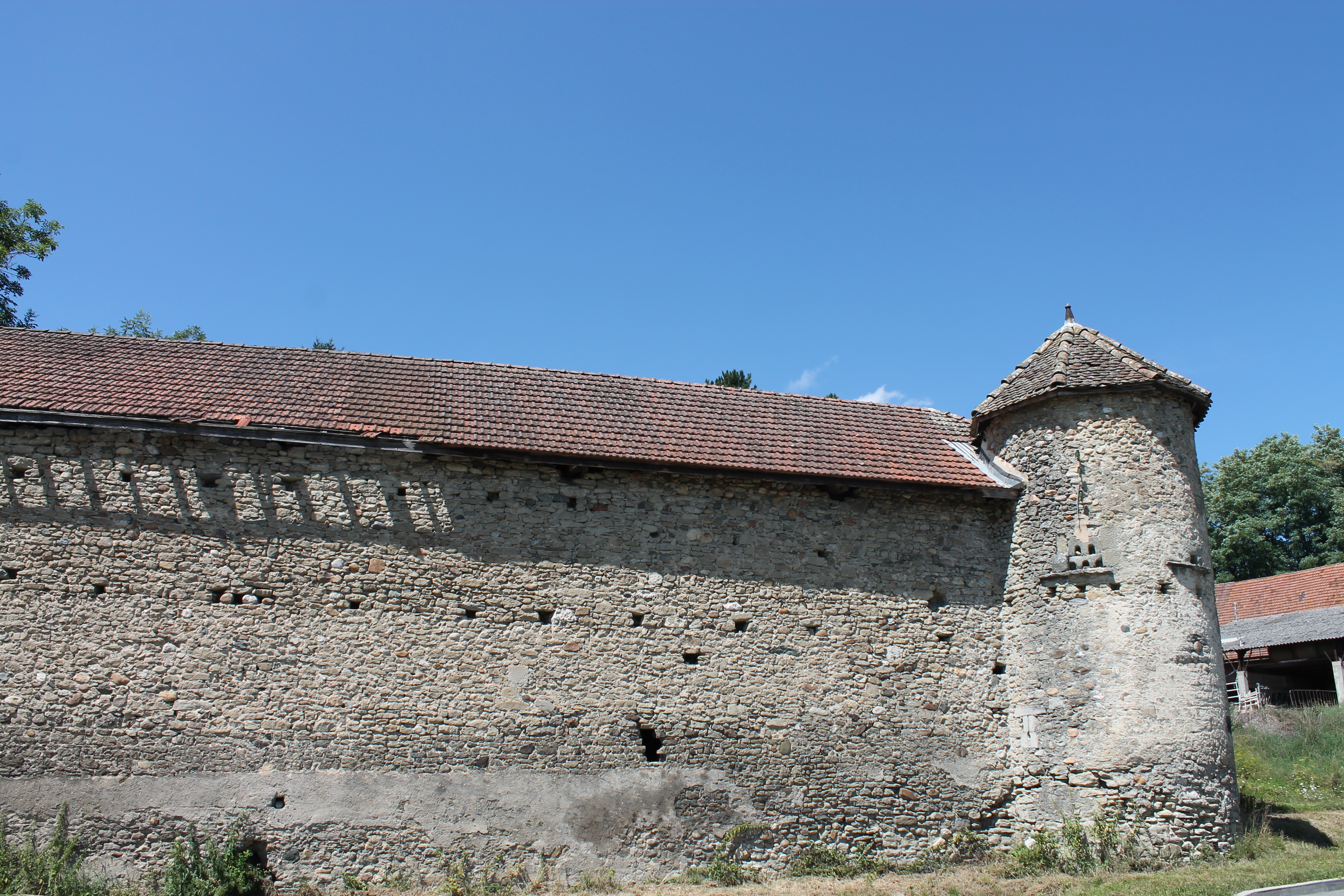 Ruines de la maison forte de Mionnaz (début du Template:S-), située sur la commune française de Menthonnex-sous-Clermont (Haute-Savoie).